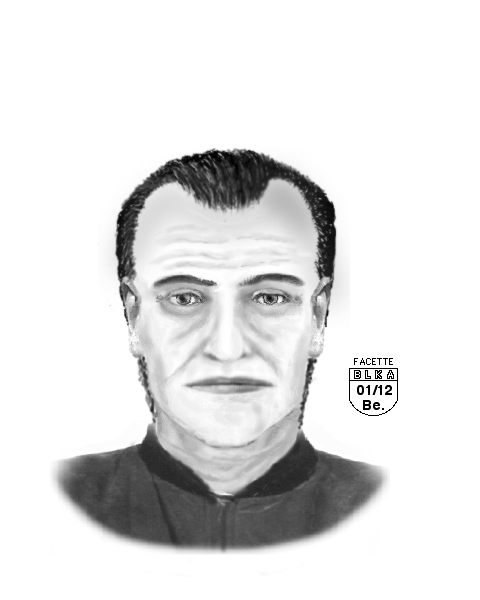 Phantombild zu einem versuchten Raubüberfall am 05.01.2012 auf ein Tabakgeschäft in der Bahnhofstraße in Bad Kötzting